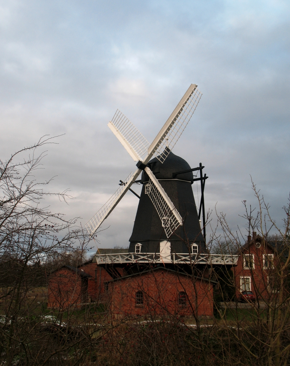 MAJBØLLE MØLLE, Majbølle Byvej 82, Majbølle, Lolland Eget foto, Noorse Forminsket versjon for Wikipedia